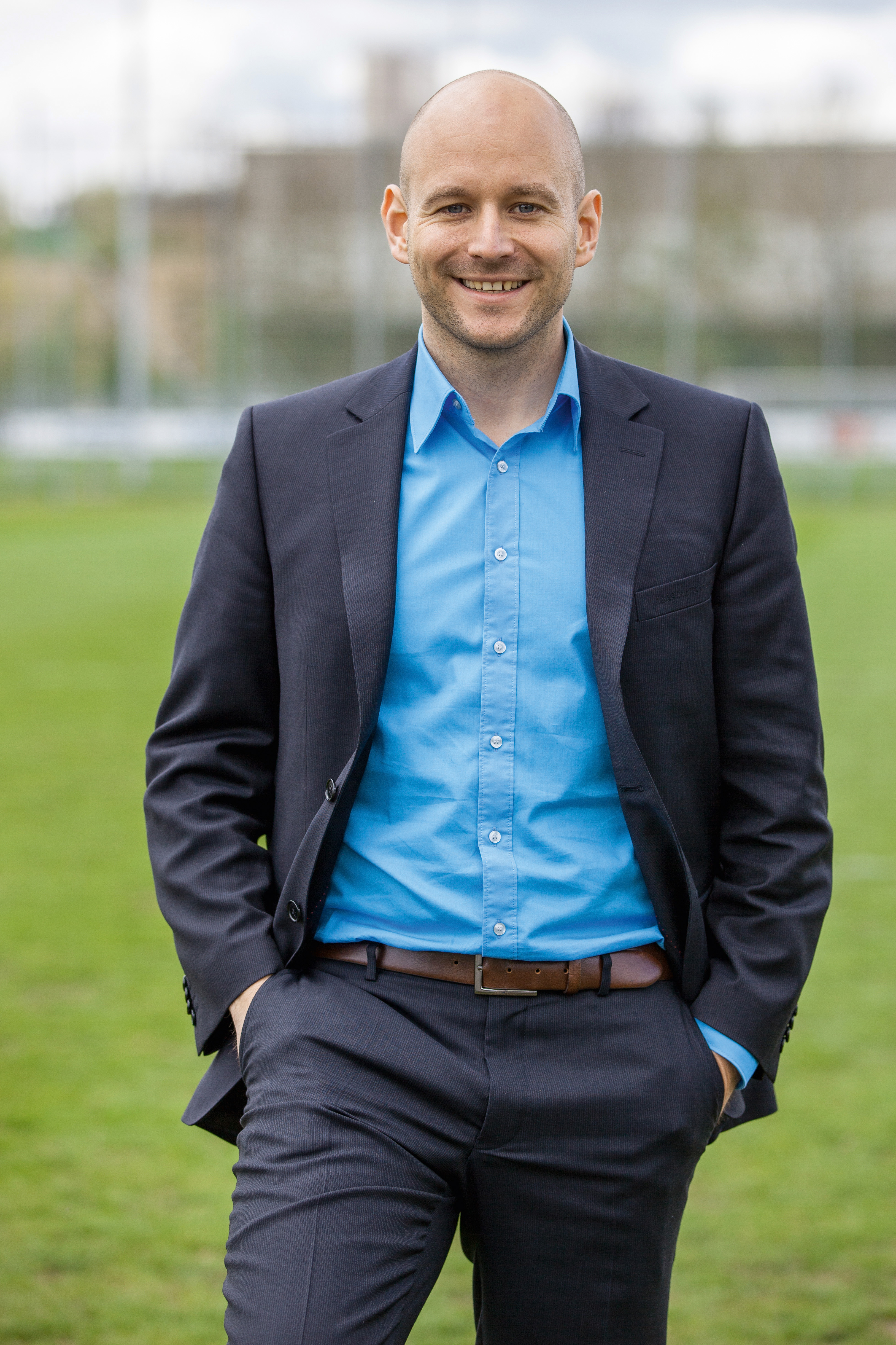 Alexander Rosen, Direktor Profifußball TSG 1899 Hoffenheim